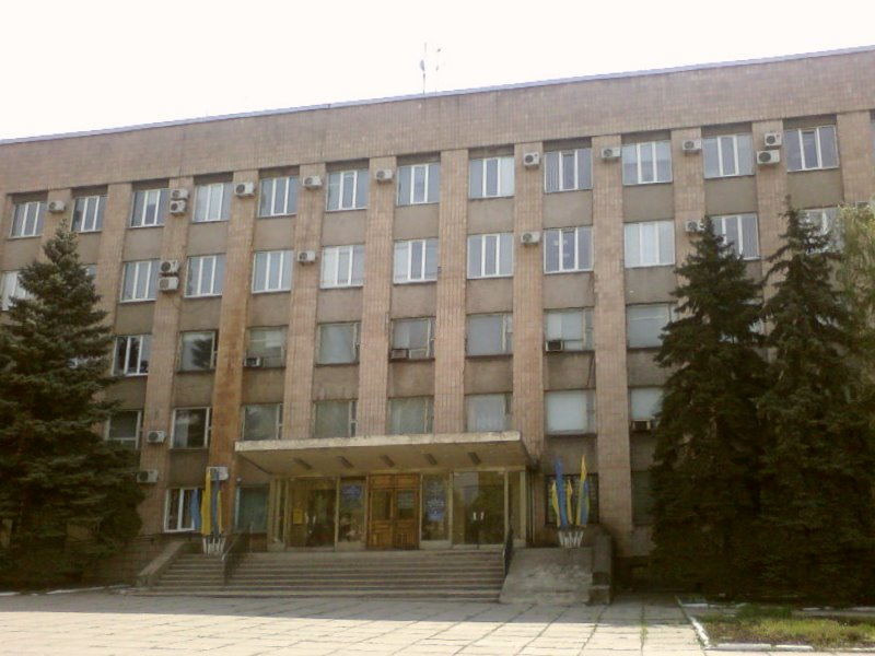 Будівля райради Іллічівського району Маріуполя